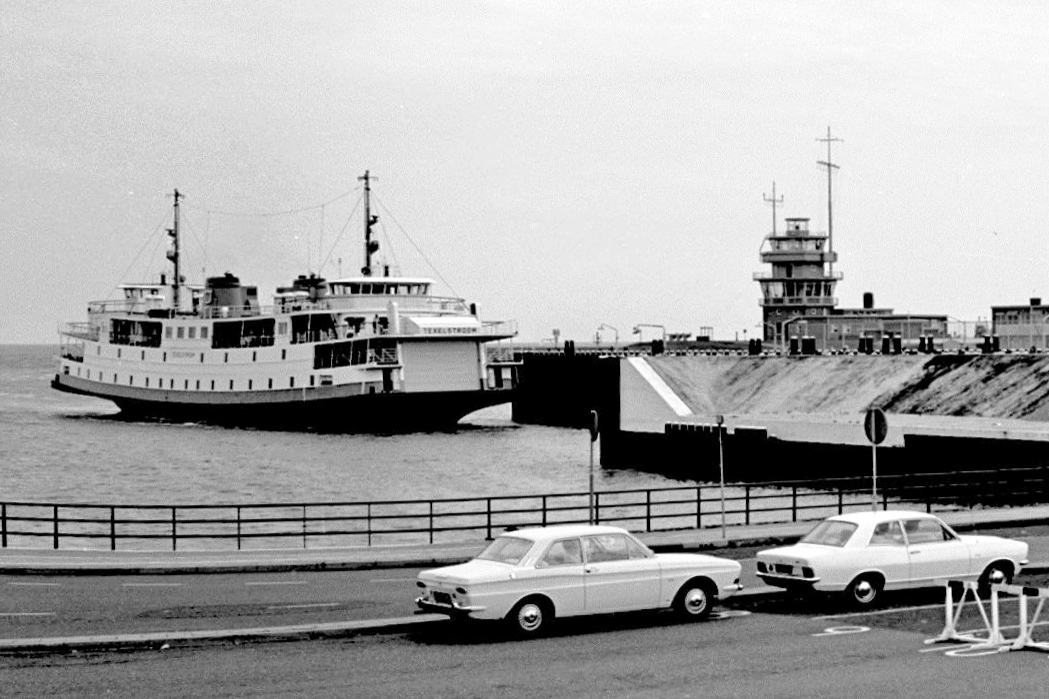 De nieuwe veerboot Texelstroom in de veerhaven van Den Helder, 20-9-1967.